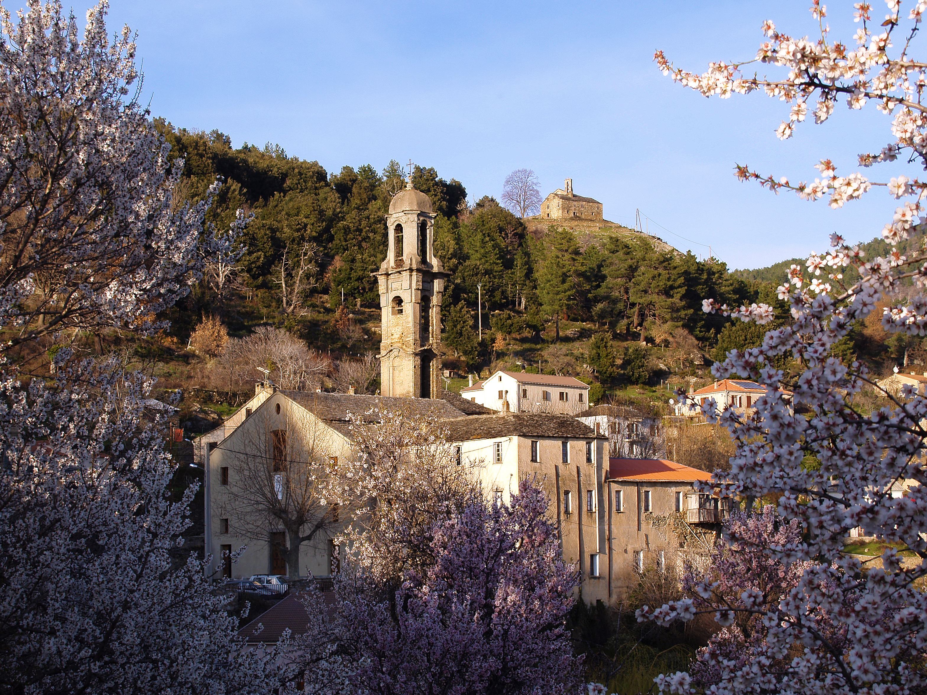 Morosaglia - Convento